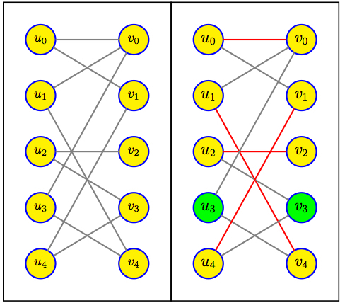 Hopcroft-Karp-exemple-premiere-partie